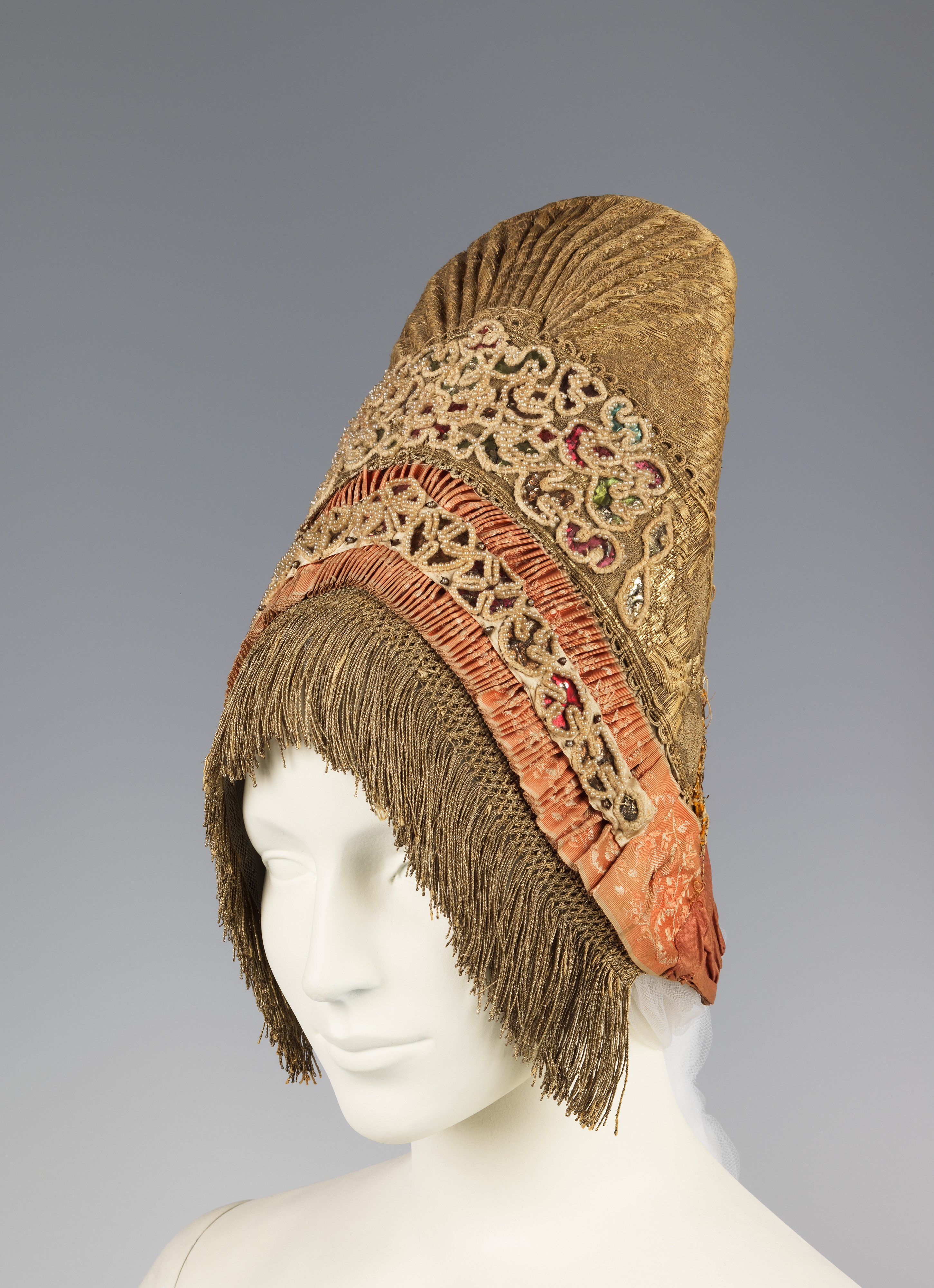 Русский женский головной убор. Russian; Headdress